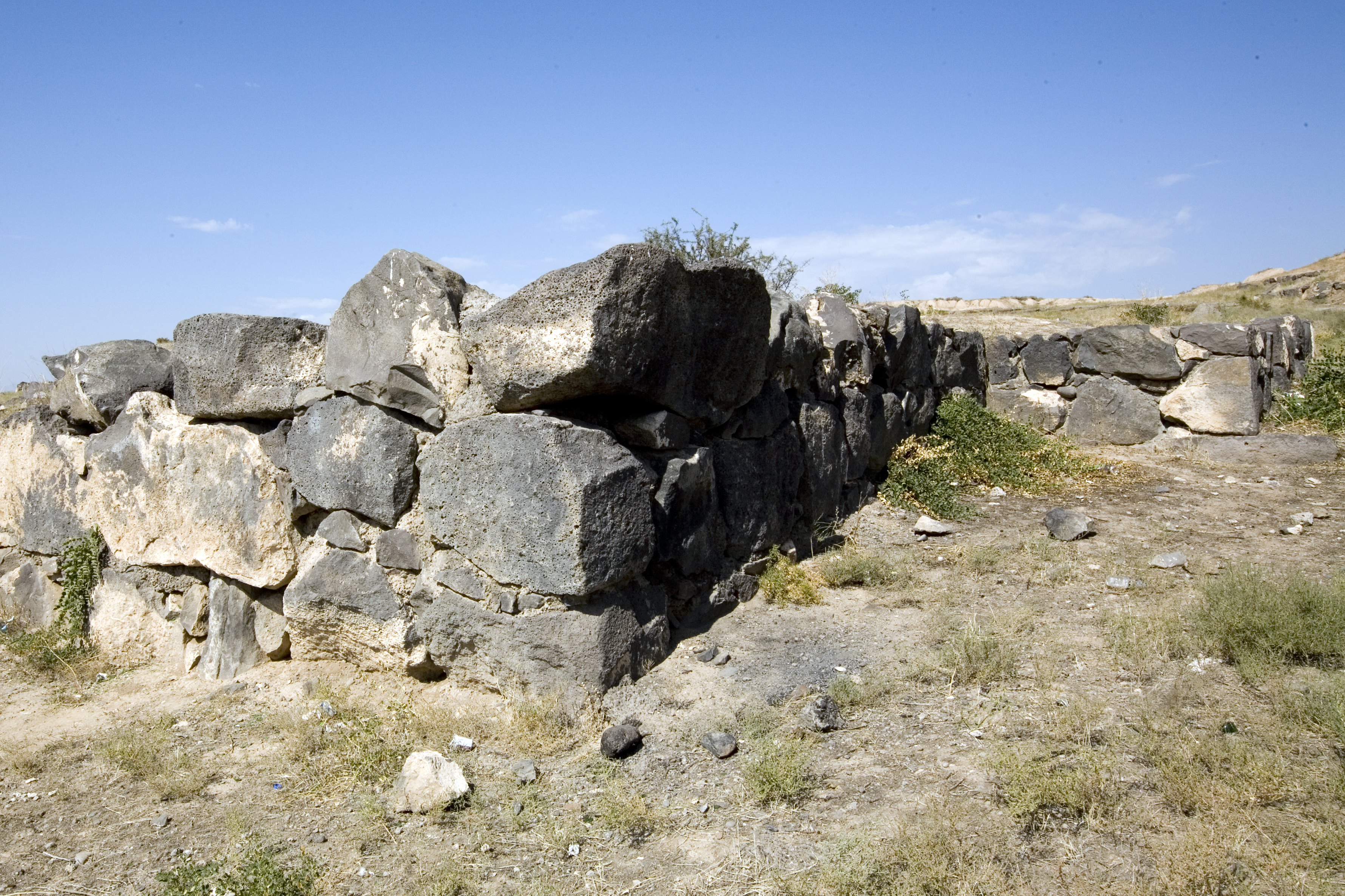 Wall at Karmir Blur (Urartu). Teishebaini, Armenia.